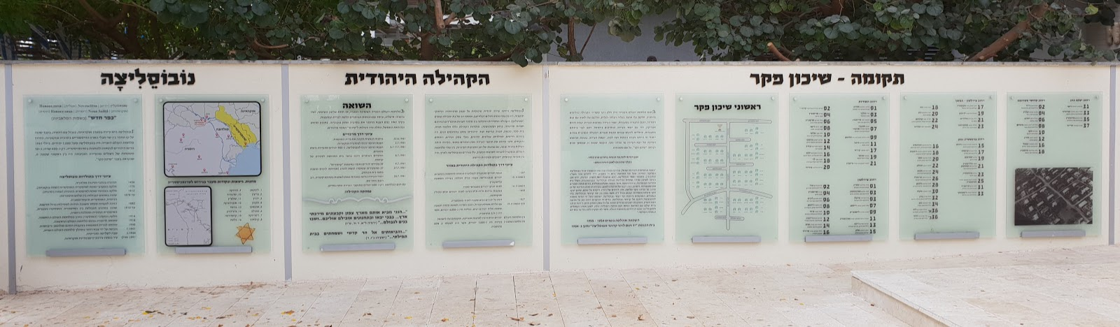 Shikun peker and novoselitsa heritage wall in Ramat Hasharon